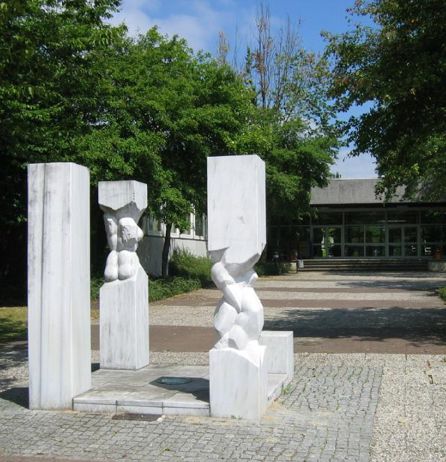 Blick auf den Haupteingang des Gymnasiums Lohne